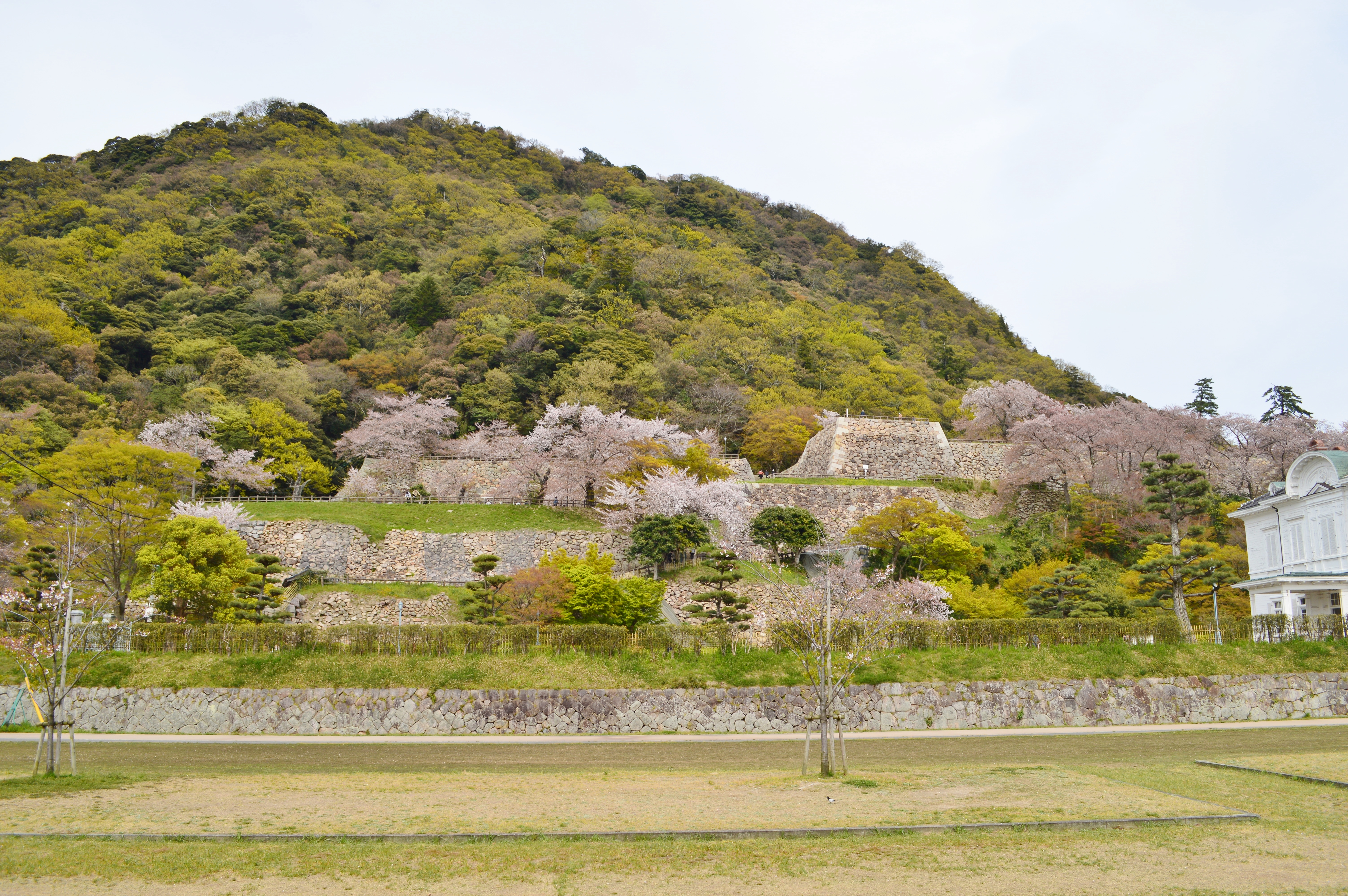 鳥取城 全景 Nikon D3200